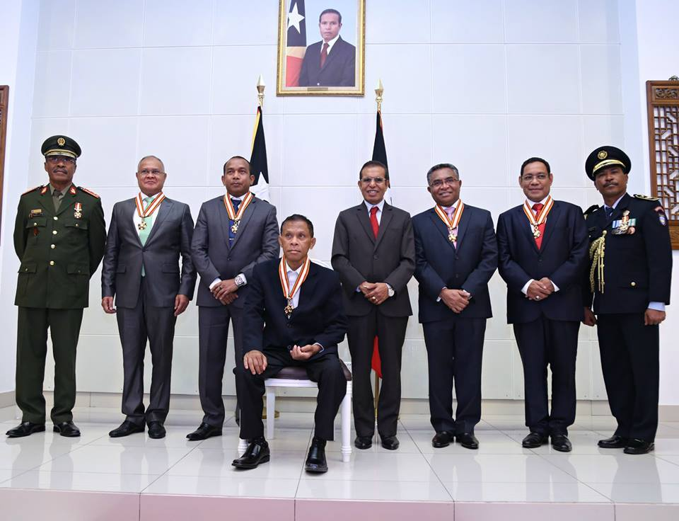 Verleihung des Ordem de Timor-Leste. Von Links: Brigadeiro General Filomeno da Paixão de Jesus ex-Presidente Parlamento Nacional, Dr. Vicente da Silva Guterres Presidente Parlamento Nacional, Dr. Adérito Hugo da Costa ex-Presidente do Tribunal de Recurso, Juiz Guilhermino da Silva Presidente Taur Matan Ruak Primeiro-Ministro, Dr. Rui Maria de Araújo Procurador Geral da República, Dr. José da Costa Ximenes 2º. Comandante Geral da PNTL, Comissário Faustino da Costa